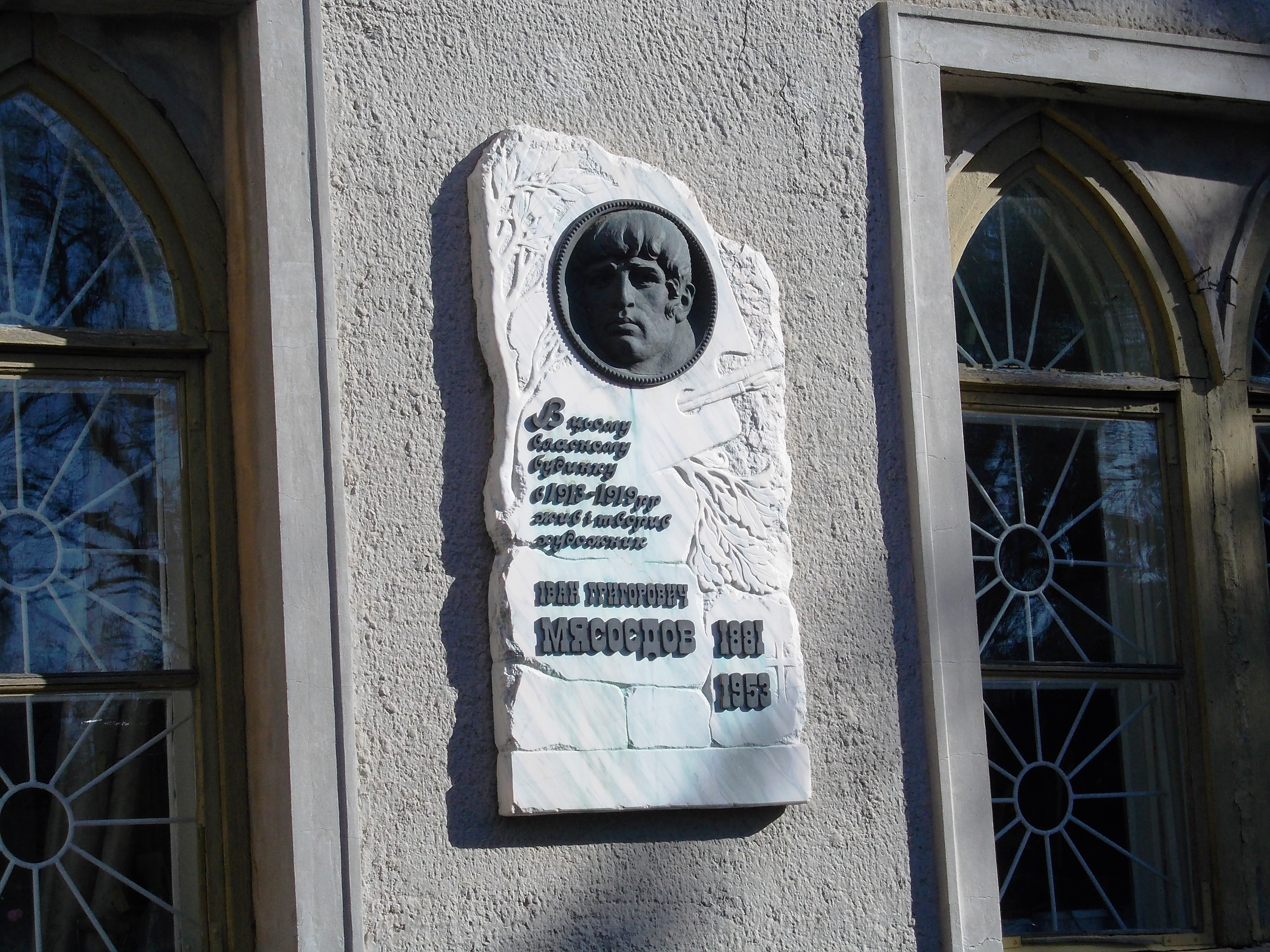 Меморіальна дошка на фасаді Полтавської гравіметричної обсерваторії. Колишній будинок живописця.